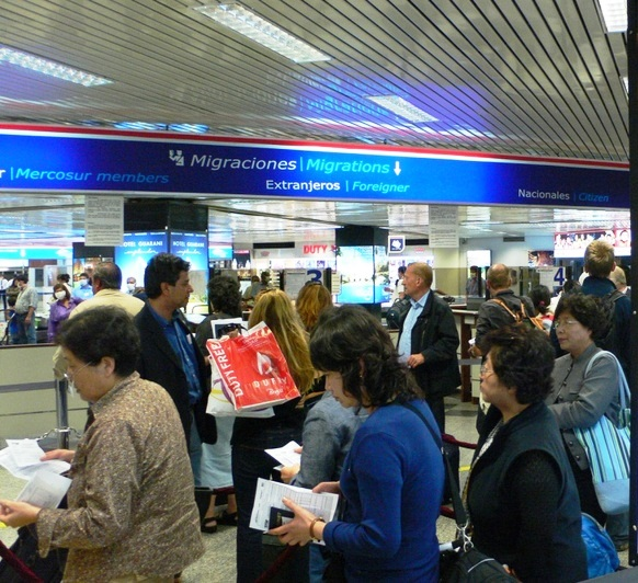 Passkontrolle am Aeropuerto Internacional Silvio Pettirossi (Paraguay) mit der Einteilung Ciudadanos Mercosur, Extranjeros y Nacionales del Paraguay.